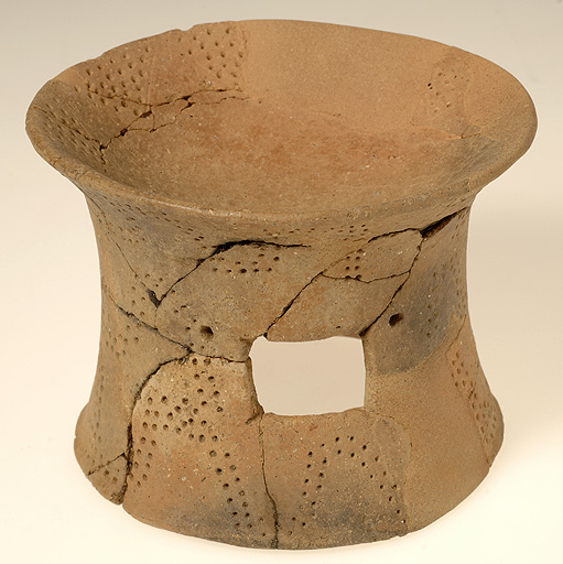 Coupe à haud pied circulaire, avec une fenêtre encadrée de deux perforations. Terre beige-saumon à ocre. Le décor géométrique incisé et pointillé est un exemple du style Castellic-Chasséen (sud Bretagne). Site : Kerléan à Concarneau.